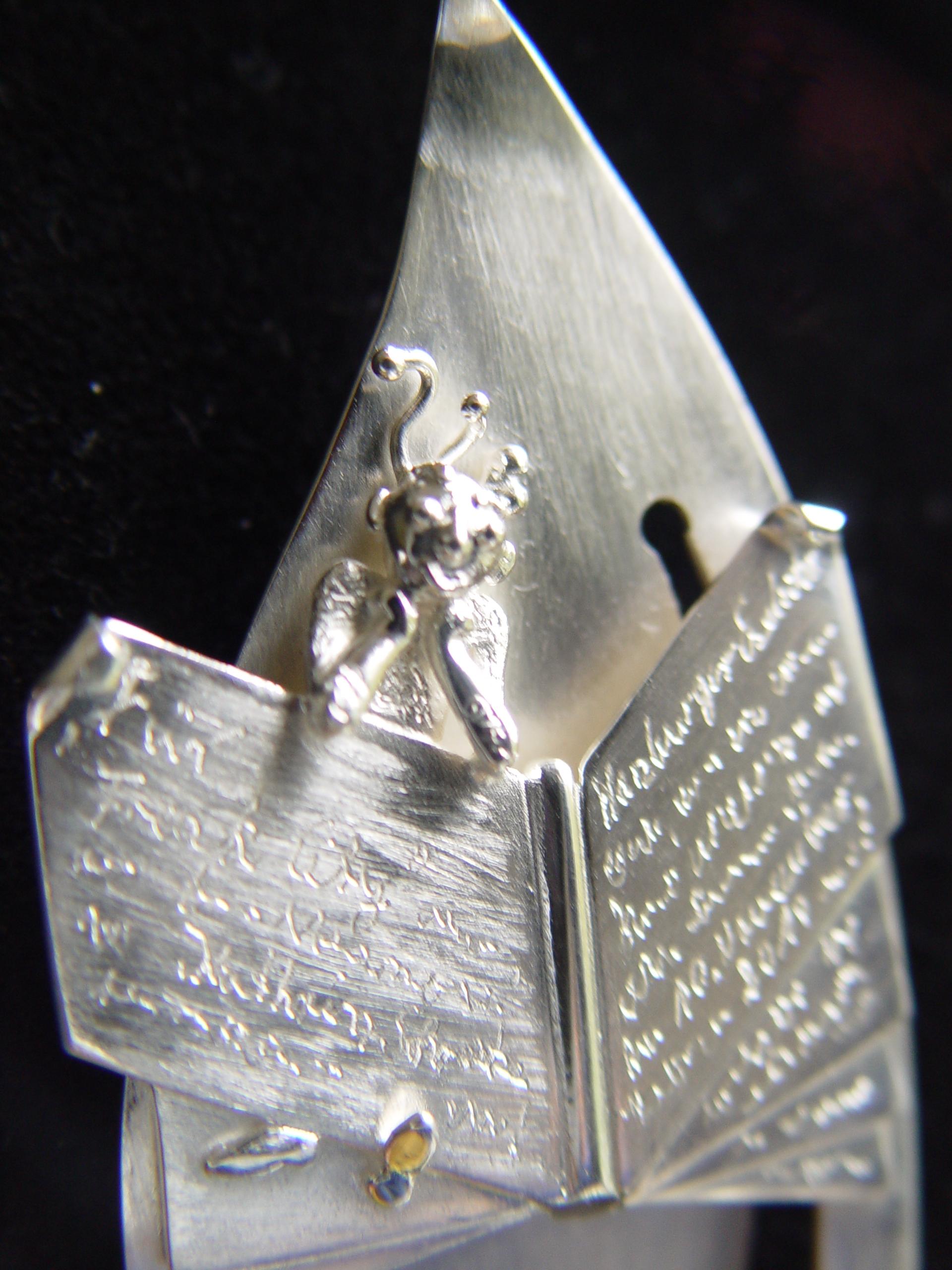 Eigenes Foto, lizenziert von der Herstellerin